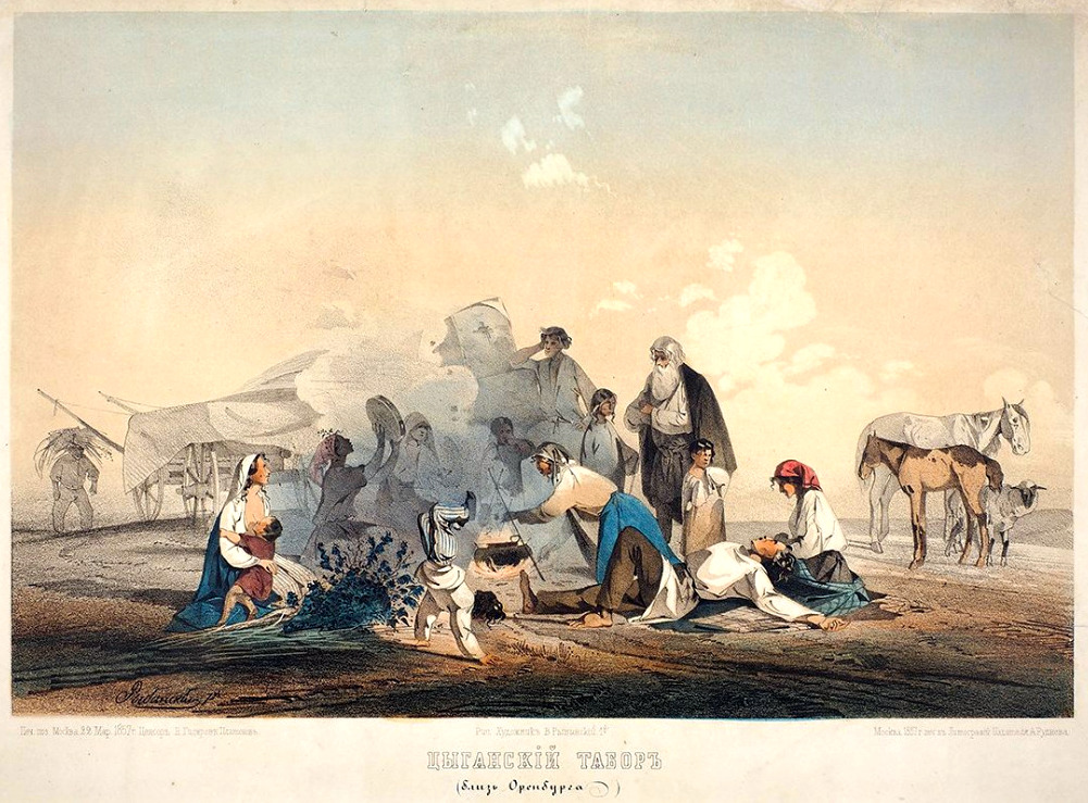 В левом нижнем углу литографированная авторская подпись: «Рыбинский 1й». Под изображением выгравированы надписи: «Печ. поз. Москва 22 Мар. 1857г. Ценсоръ Н.Гиляровъ Платоновъ. / Москва 1857г печ. въ Литографiи Издателя А.Руднева / Рис. Художникъ В.Рыбинскiй 1й / ЦЫГАНСКИЙ ТАБОРЪ / (близъ Оренбурга)».